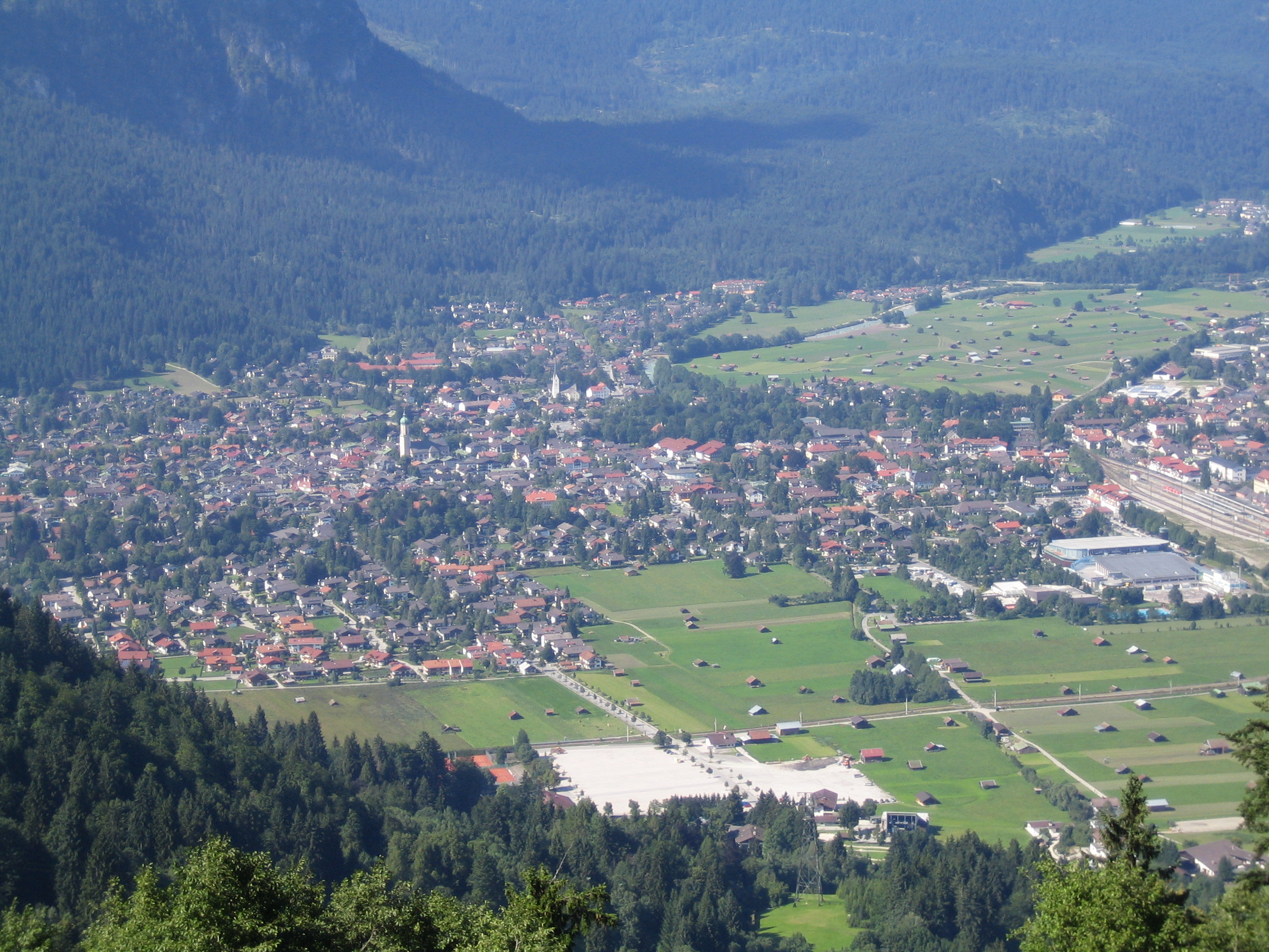 Garmisch-Partenkirchen Teilansicht (südl.Teil)